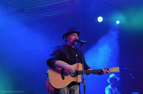 Joaquin Sabina en concierto //Joaquin Sabina in concert